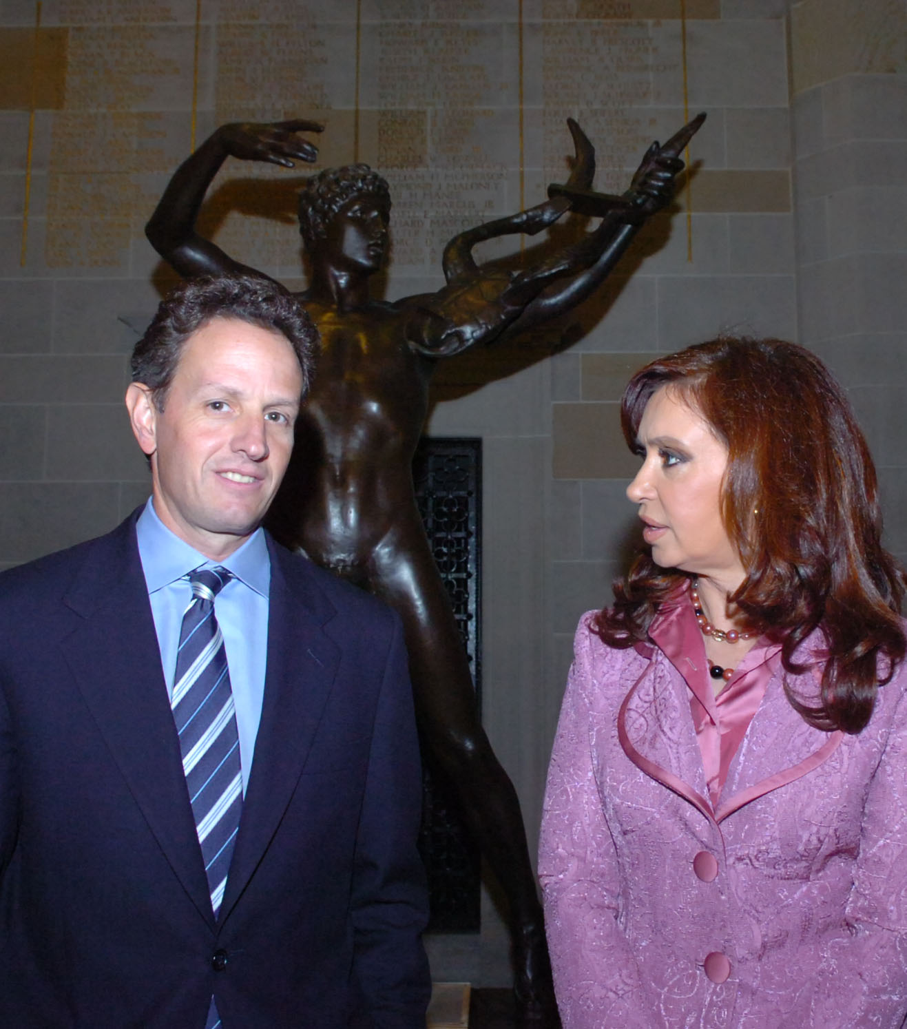 La senadora Cristina Fernández de Kirchner se reunió con el presidente de la Reserva Federal de Nueva York, Timothy Geithner.